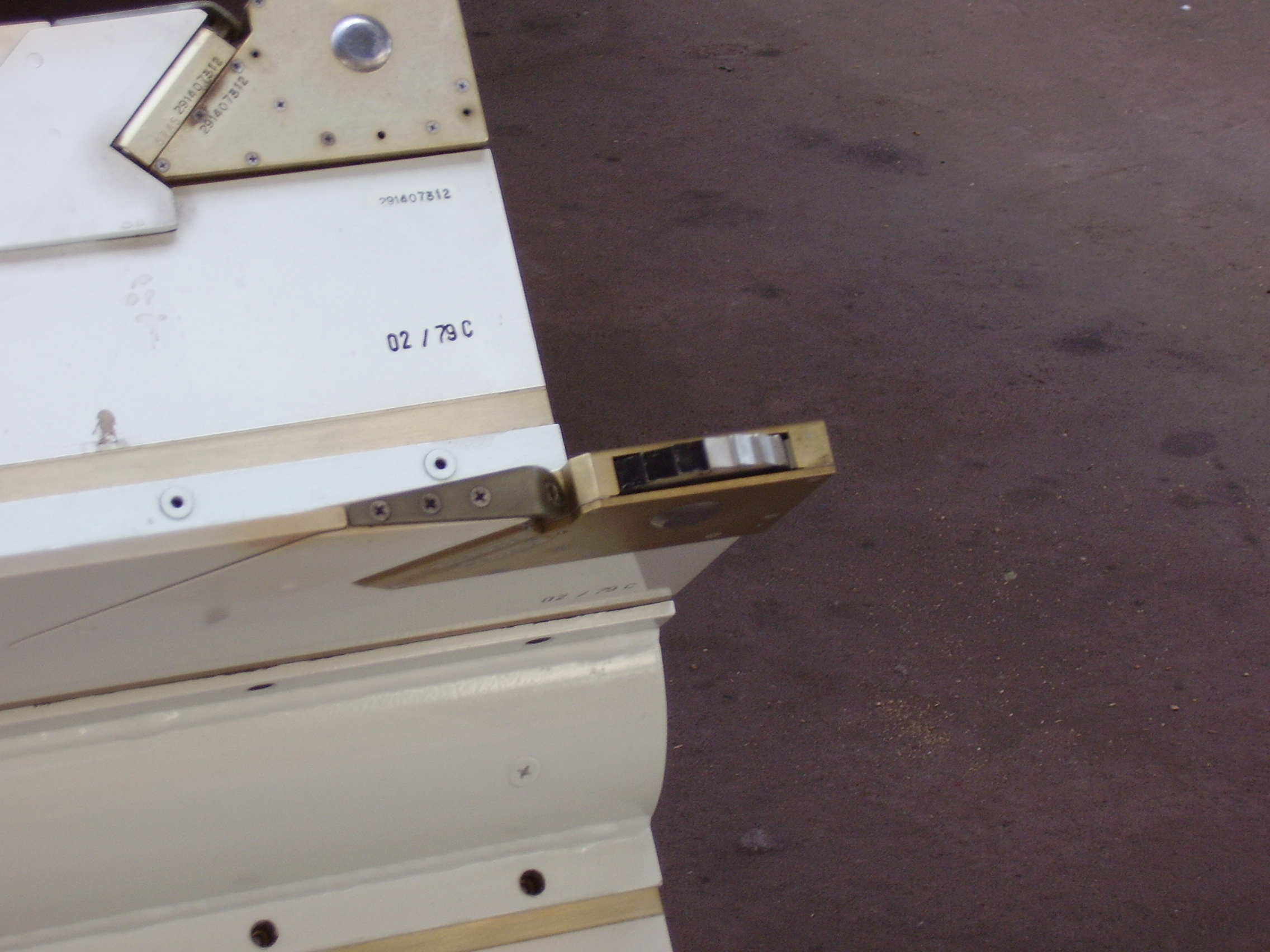 Royal Military Museum Brussels, Musée Royal de l'Armée, Koninklijk Museum van het Leger en de Krijgsgeschiedenis, Sidewinder